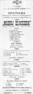 Абвестка аб спэктаклі "Модны шляхцюк" (1910 г.) трупы Буйніцкага